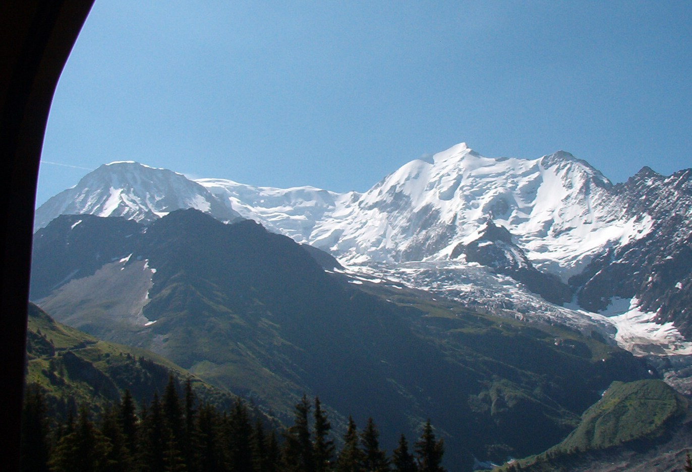 Monte Bianco visto dal treno a cremagliera che porta alla via normale francese di salita